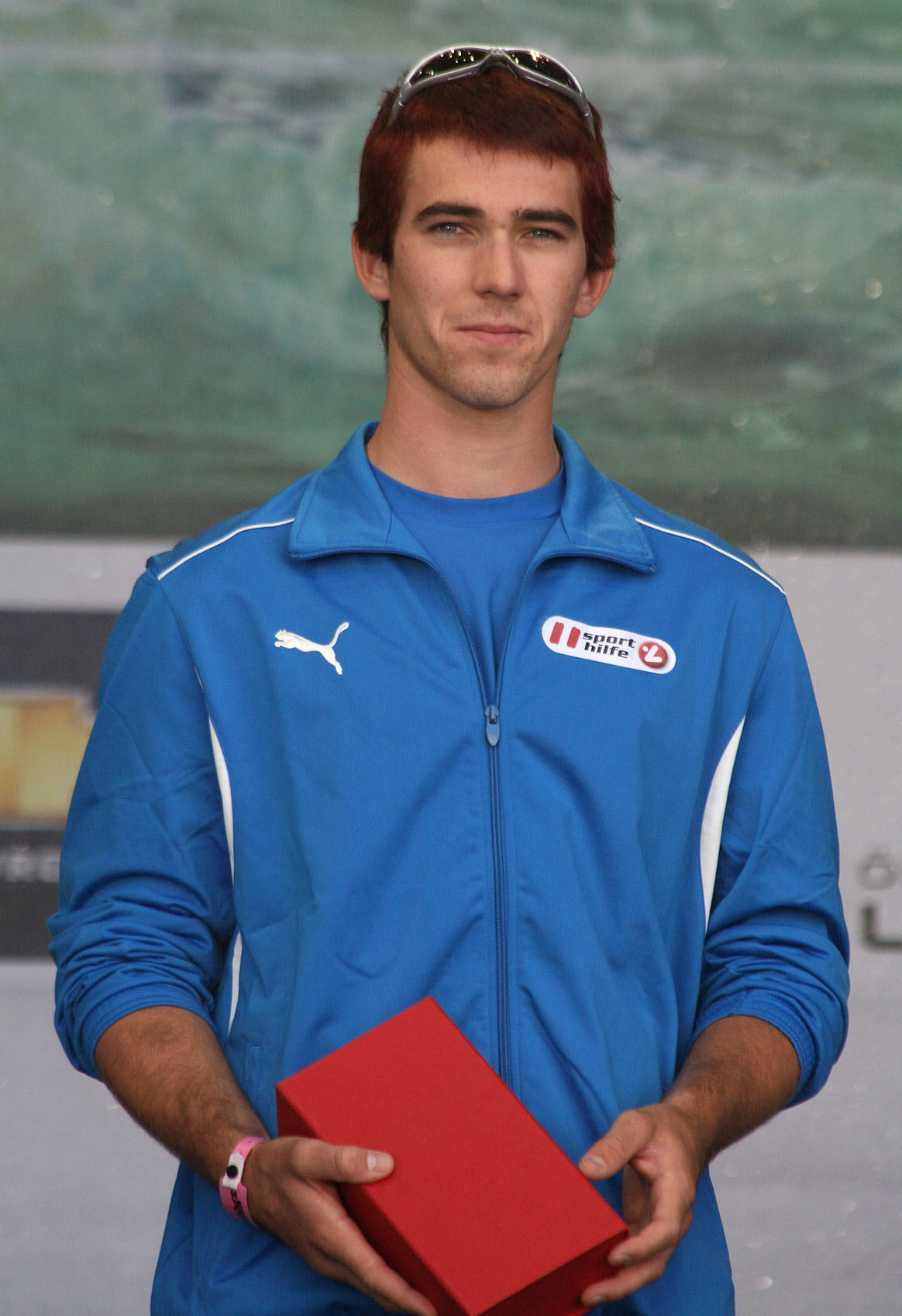 Jakob Rest am Tag des Sports 2009 auf dem Heldenplatz in Wien